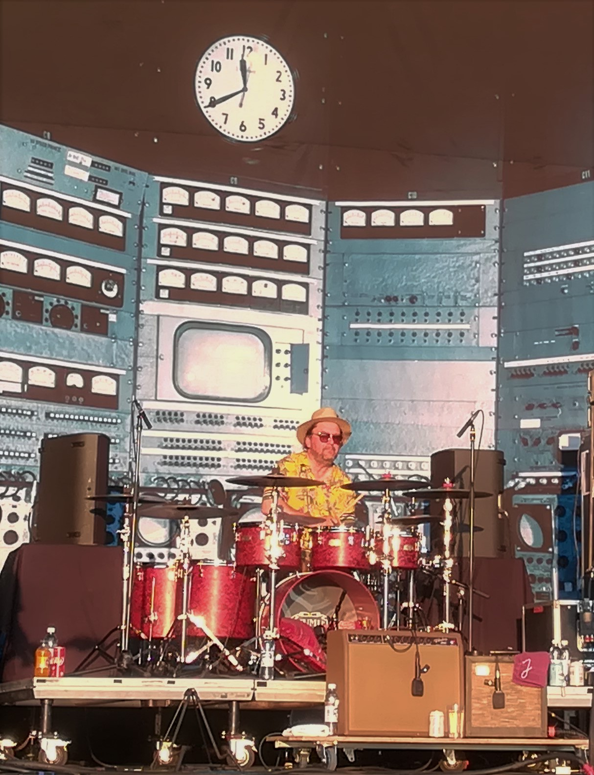 Janne Haavisto kesällä 2019 J. Karjalaisen keikalla.